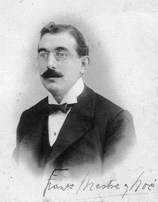 Polític,Periodista, membre de la Renaixença, historidor, crític d'art, arqueòleg, lingüísta i activista social ebrenc.